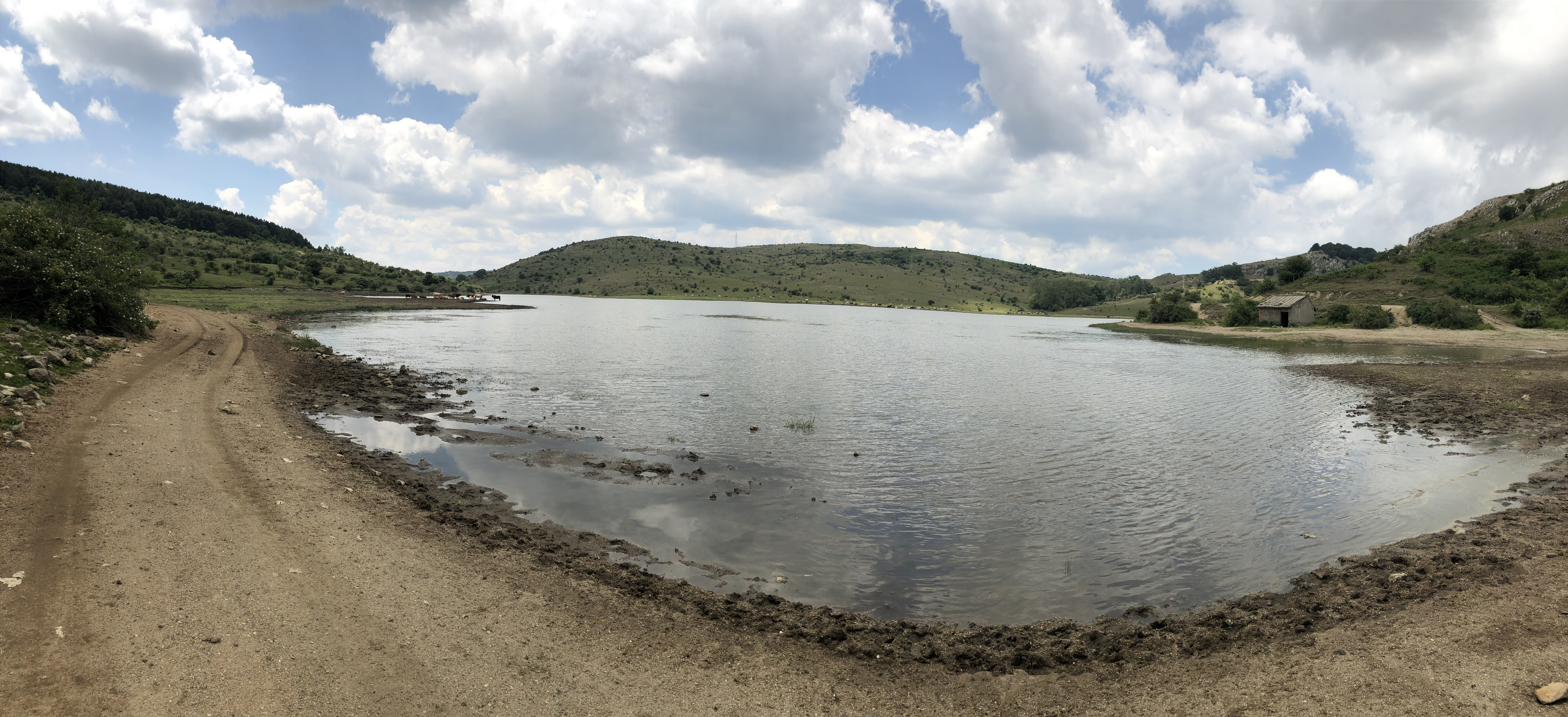 Monti Nebrodi (Q55413358)